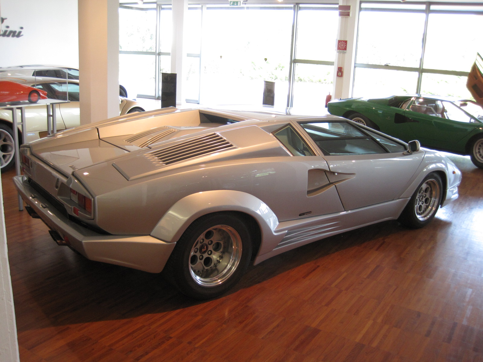 Musée Lamborghini - Countach 25e anniversaire